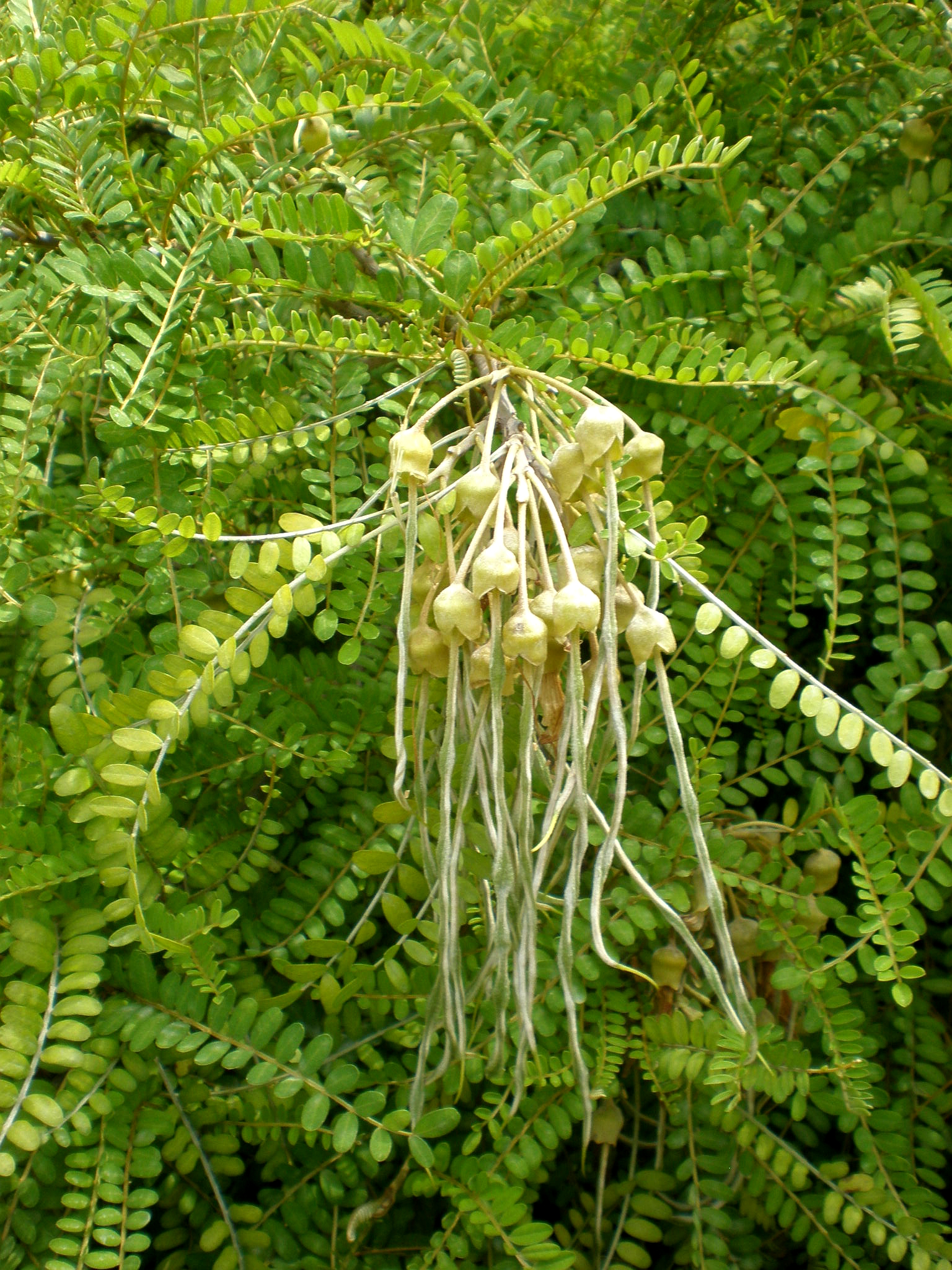 Jardín Botánico de Barcelona.